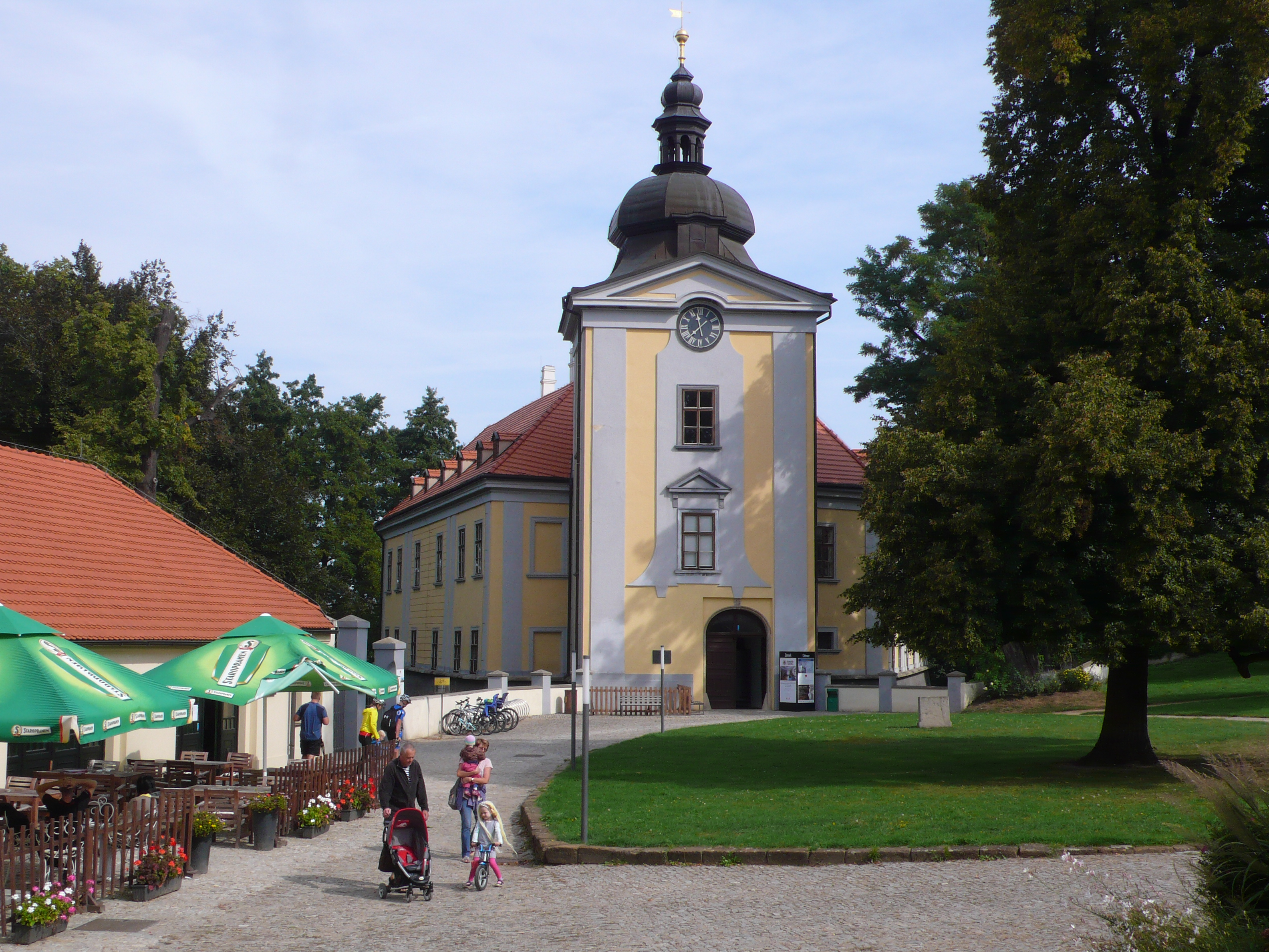 Zámek Ctěnice (2015)